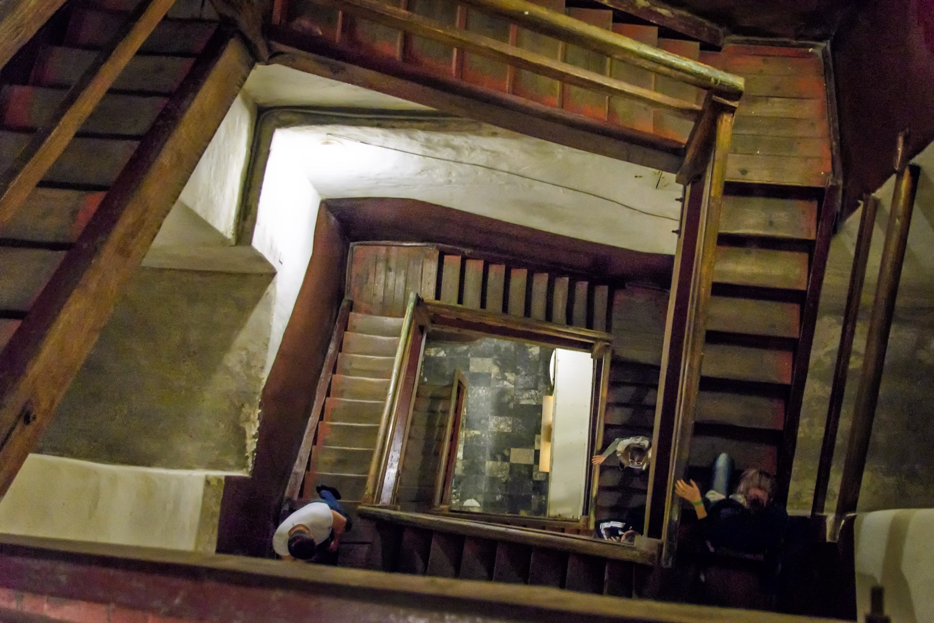 ратуша, Львів, Ринок пл., 1